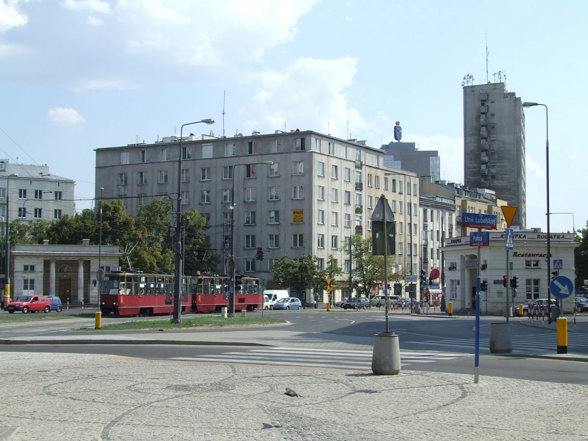 Plac Unii Lubelskiej, Warszawa, Poland